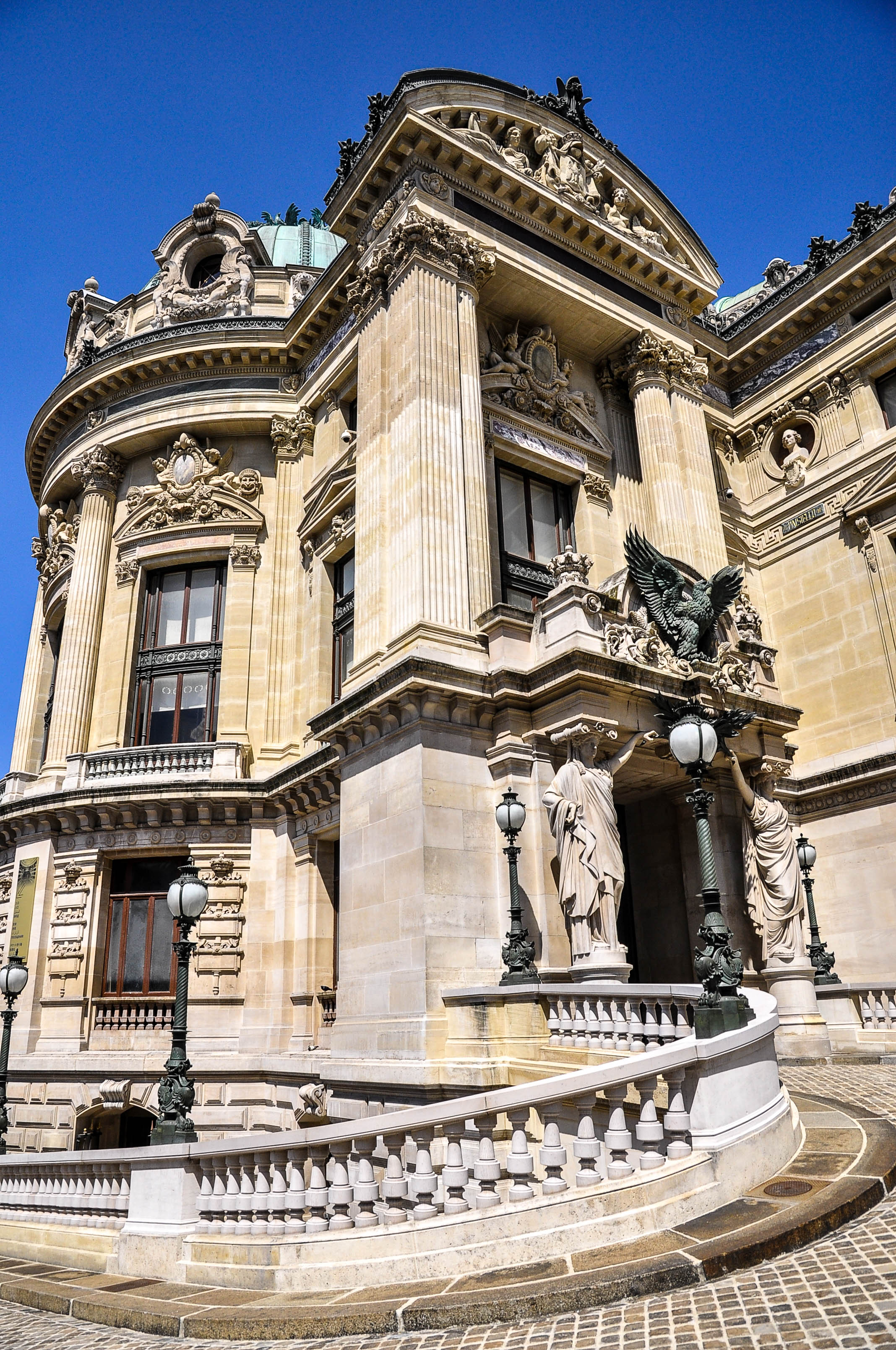 Façade ouest de l'Opéra Garnier, Paris, France.